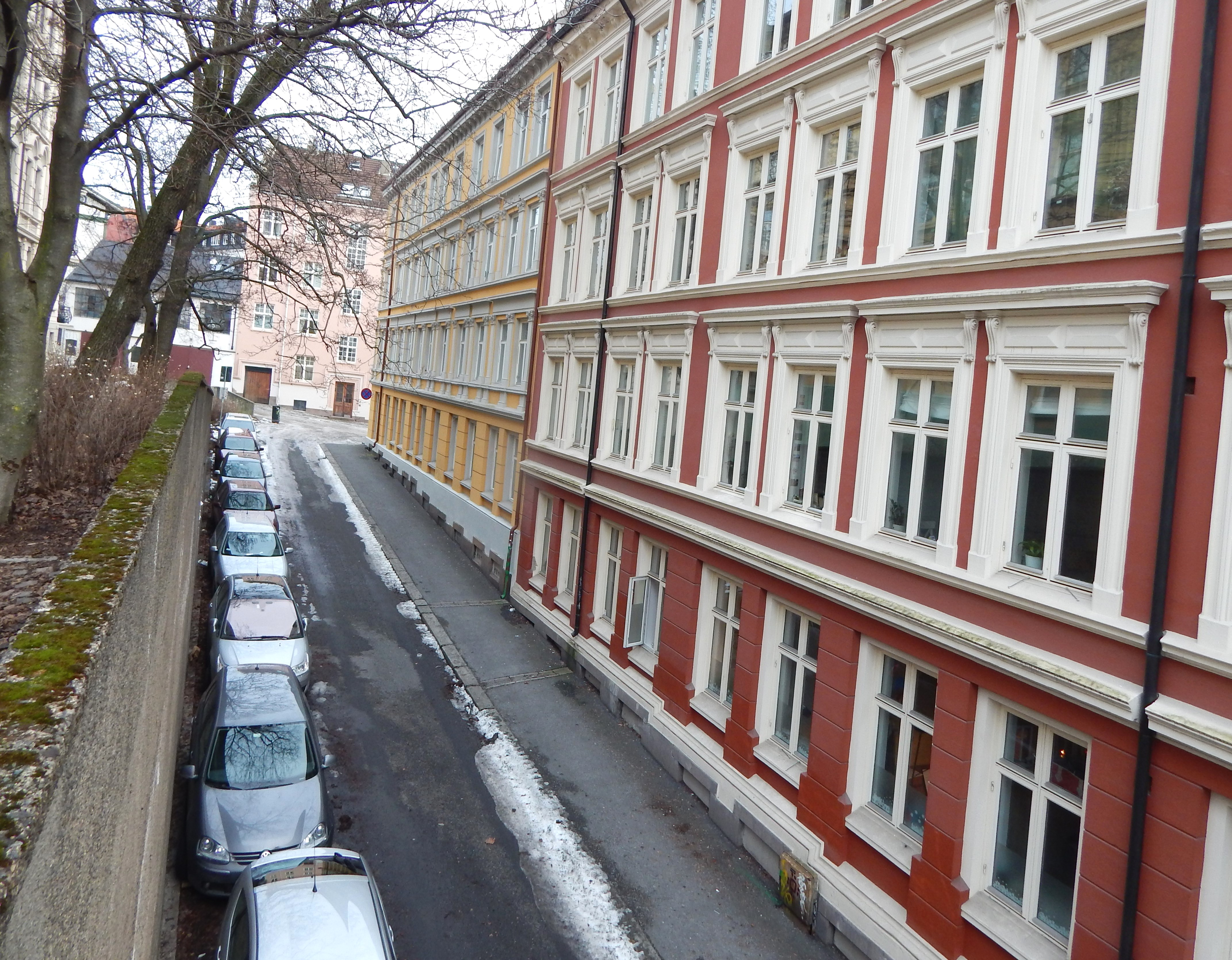 Østre del av Dovregata nedenfor platået